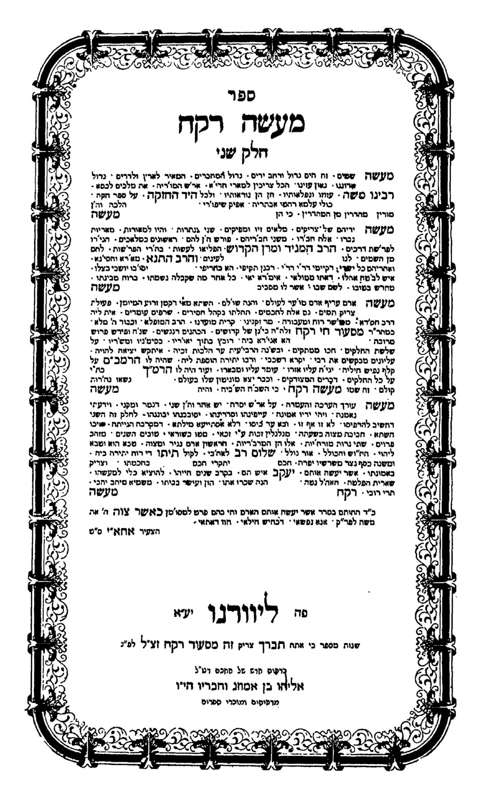 ספר מעשה רקח